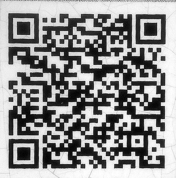 QR code fourni par Mairie de Nice